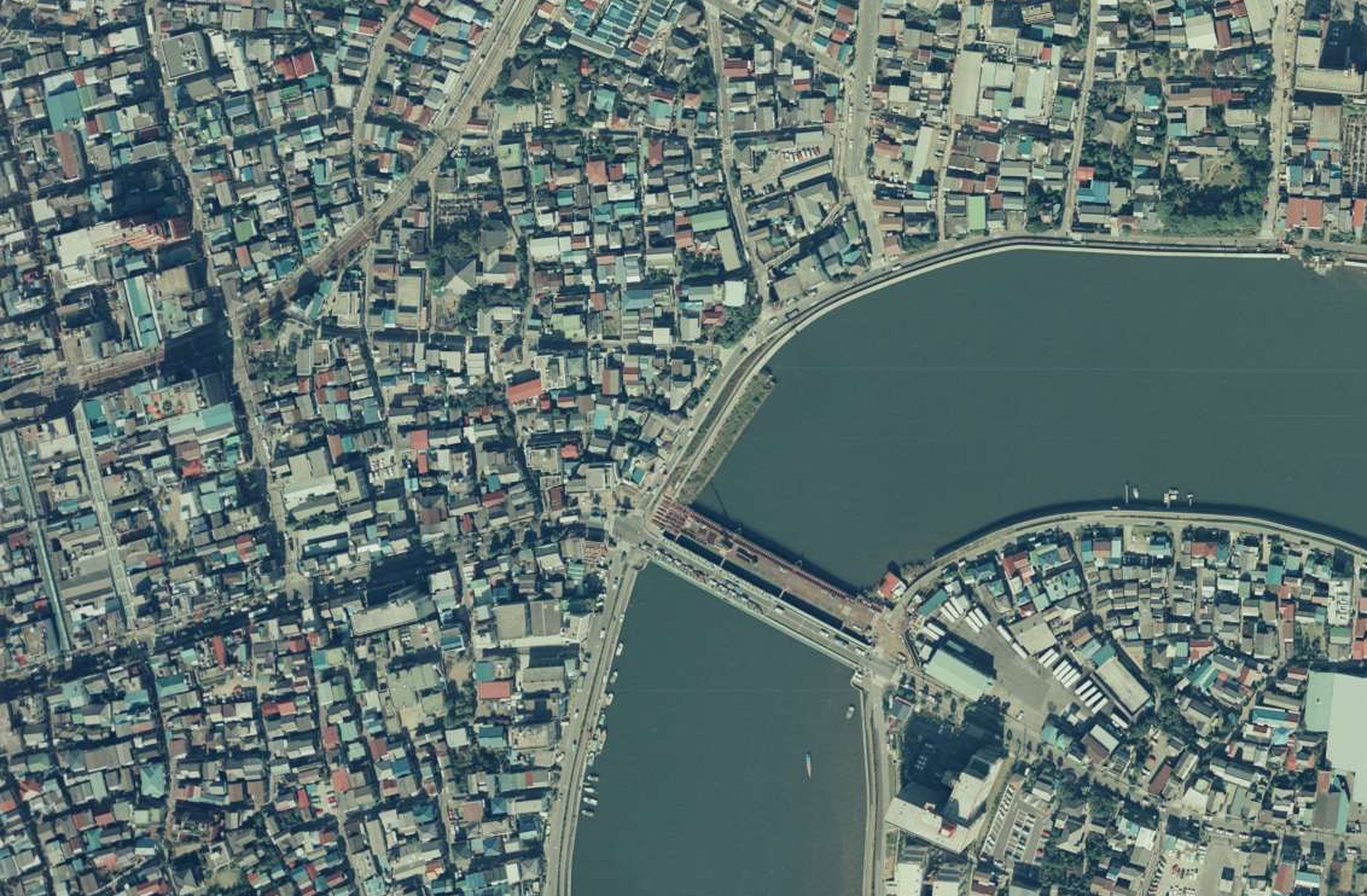 東京都葛飾区にあった本奥戸橋（旧橋）の1984年の空中写真。 上流には架替工事用の仮設橋がある。